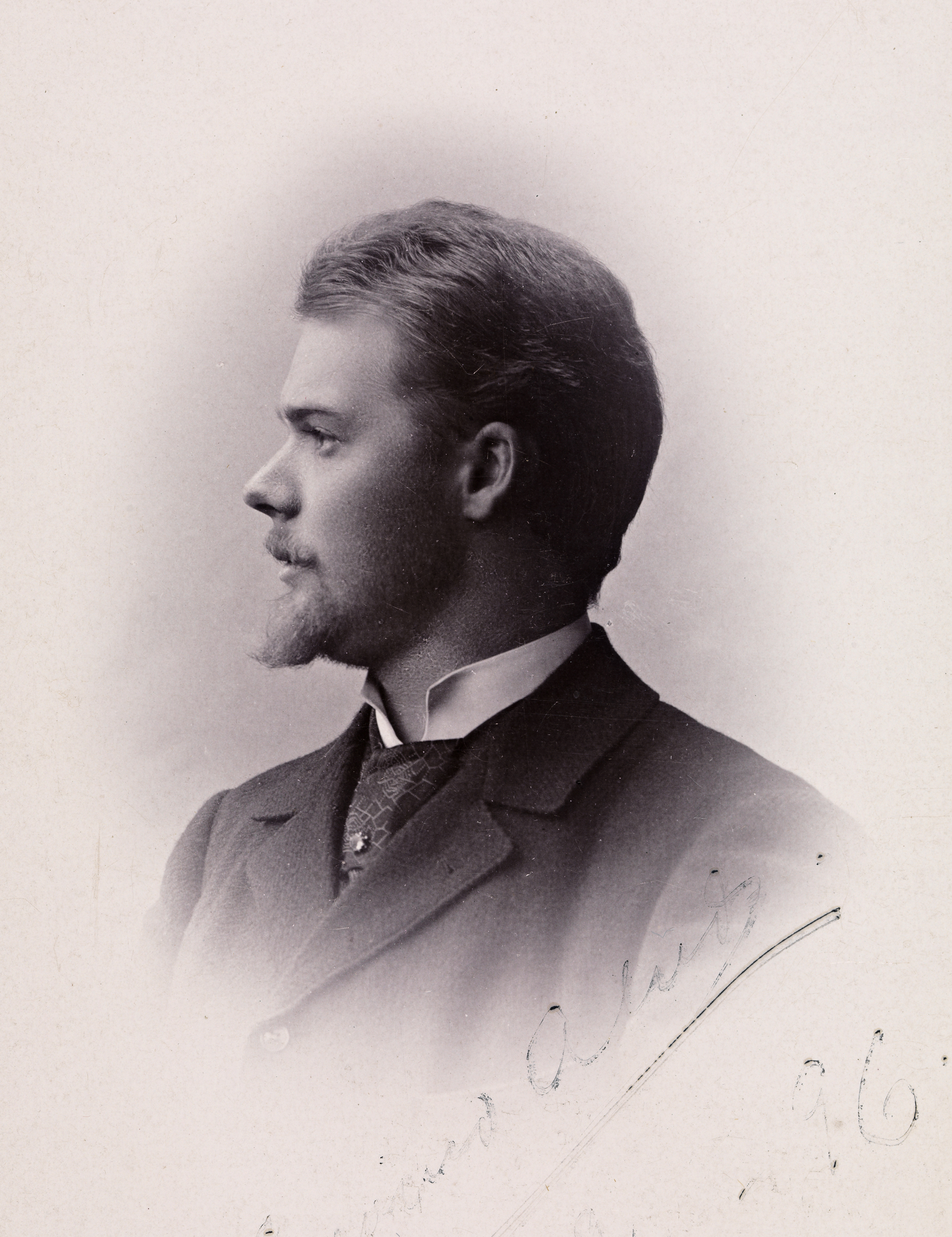 Beskrivelse / Description: Eyvind Alnæs var komponist, organist og dirigent. Dato / Date: ca. 1896 Fotograf / Photographer: Wilh. Christensen (Drammen) Digital kopi av original / Digital copy of original: s/h papirpositiv Eier / Owner Institution: Nasjonalbiblioteket / National Library of Norway Lenke / Link: Bildesignatur / Image Number: blds_02318